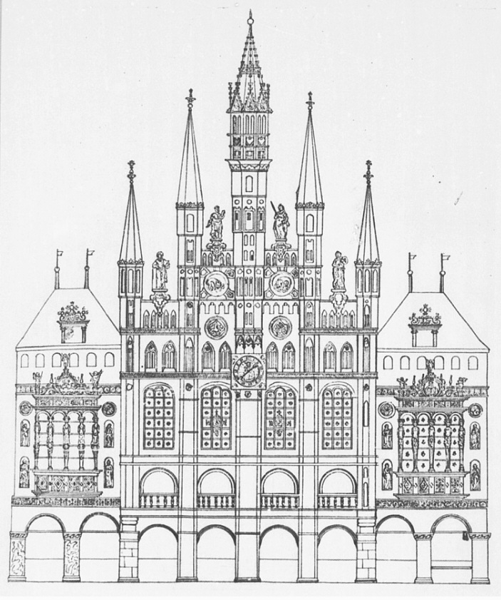 Rathaus Lüneburg, Marktfassade, nach der Daniel Frese zugeschriebenen Tuschezeichnung von 1605 Federzeichnung von Ludwig Albrecht Gebhardi, 18. Jh. (Collectanea) Gottfried-Wilhelm-Leibniz-Bibliothek, Hannover